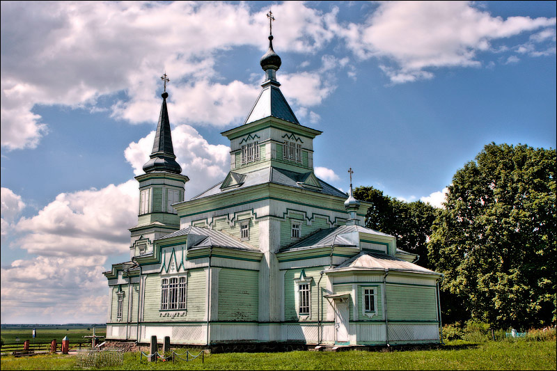 Лешня. Царква Святога Георгія